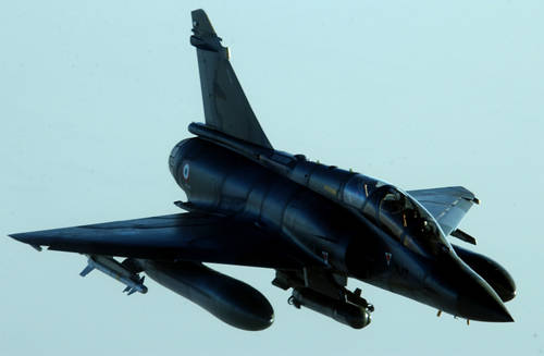 The French Mirage 2000 jet departs after being refueled by a U.S. KC-10 Extender over Afghanistan.